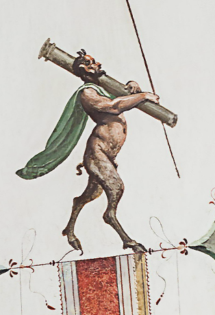 Sátiro portando una columna en el techo del Sala de las Batallas del Real Sitio de El Escorial, en Madrid, España. A ambos lados de una figura existe un sátiro portando una columna, esquema que es repetido varias veces en la decoración del techo.